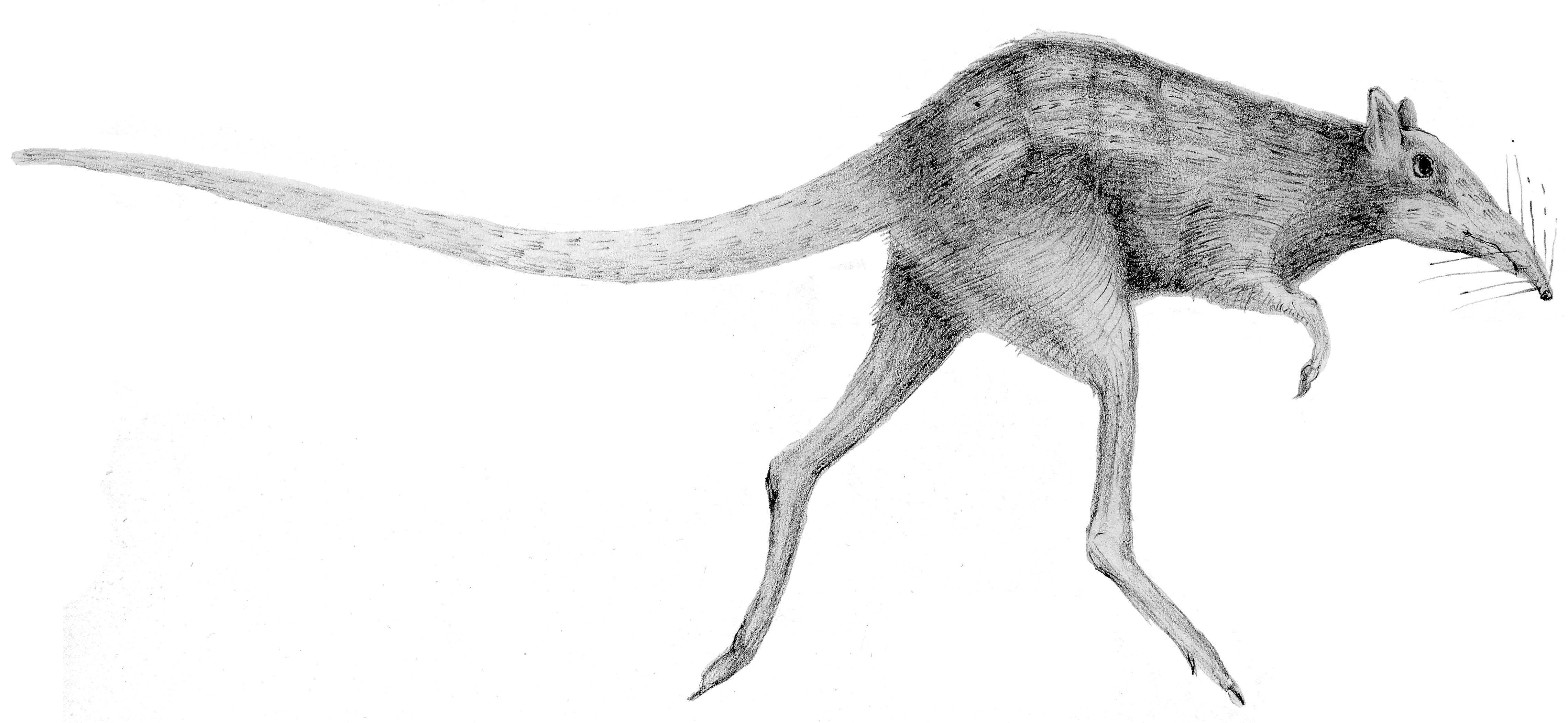 Reconstruction of Leptictidium, redrawn after: Wolfgang Maier, Gotthard Richter and Gerhard Storch: Leptictidium nasutum - ein archaisches Säugetier aus Messel mit außergewöhnlichen biologischen Anpassungen. Natur und Museum 116 (1), 1986, pp. 1–19 (p. 7 middle part) Lebendrekonstruktion von Leptictidium umgezeichnet nach: Wolfgang Maier, Gotthard Richter und Gerhard Storch: Leptictidium nasutum - ein archaisches Säugetier aus Messel mit außergewöhnlichen biologischen Anpassungen. Natur und Museum 116 (1), 1986, S. 1–19 (S. 7 mittlere Abb.)